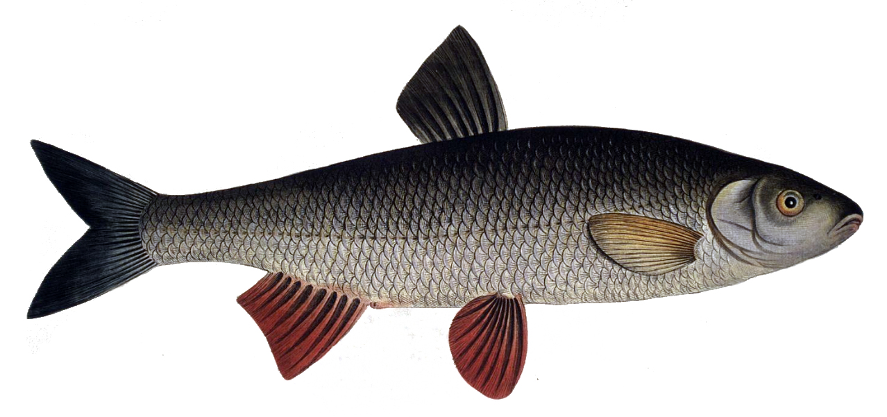 Leuciscus leuciscus